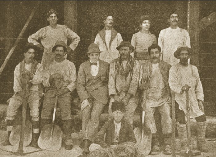 Imagen extraída del libro La masacre de la escuela Santa María de Iquique. Jefe de bodega y cuadrilla de cargadores de la Oficina Candelaria.